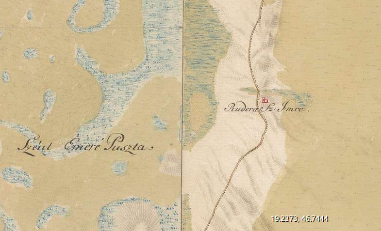 forrás